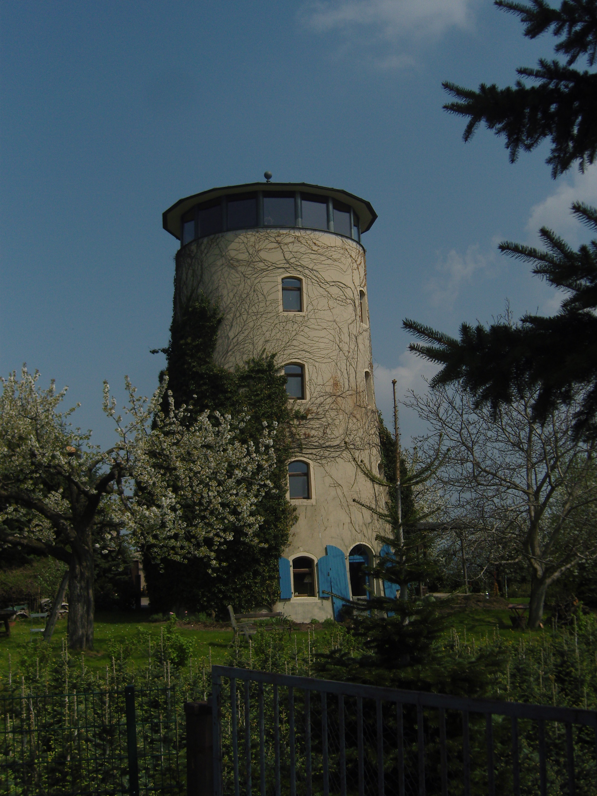 Zum Wohnhaus umgebaute Windmühle (Turmholländer) in Pegenau